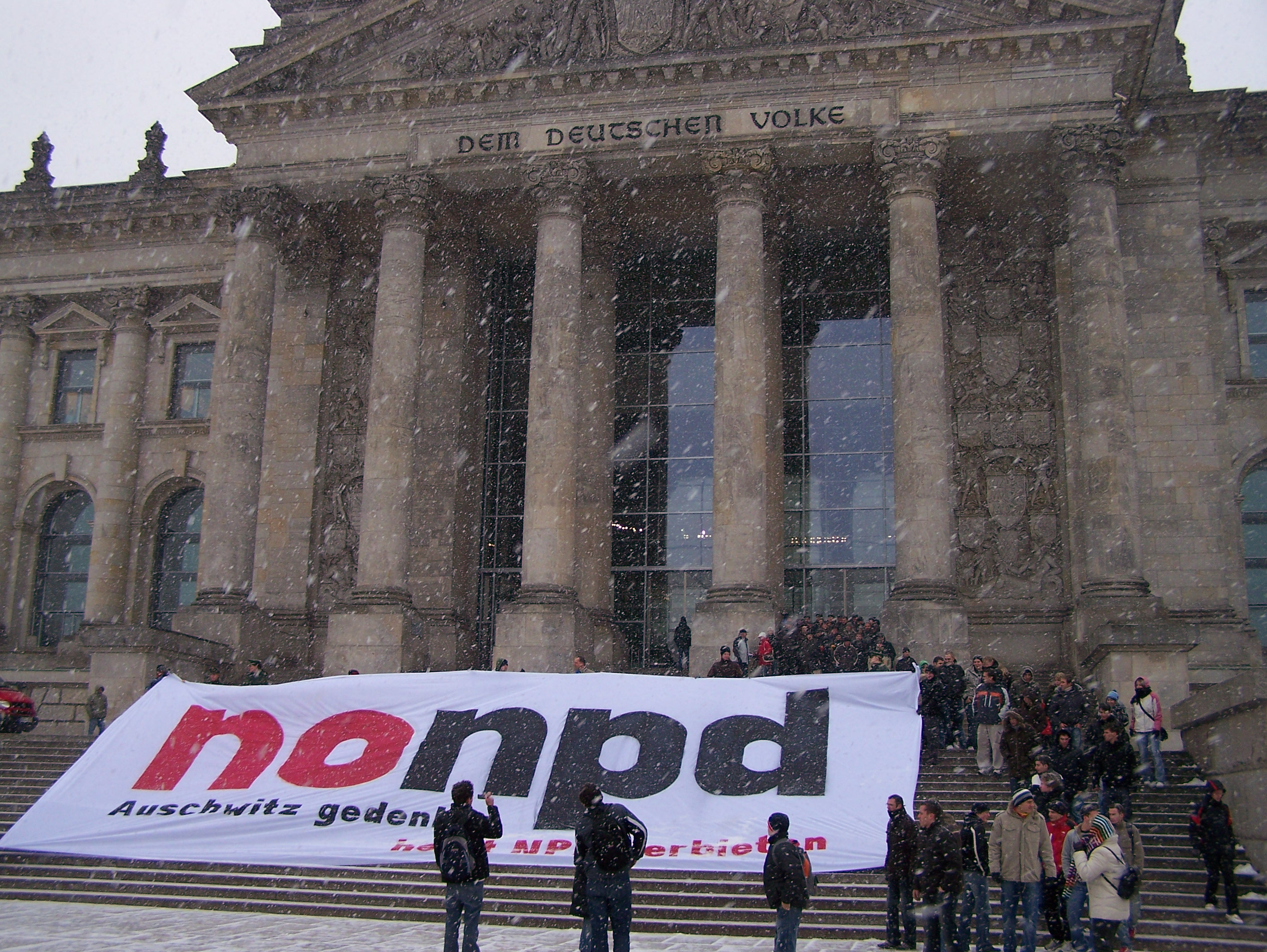 Die Kampagne nonpd macht vor dem Reichstag auf ihre Forderung nach einem NPD-Verbot aufmerksam.